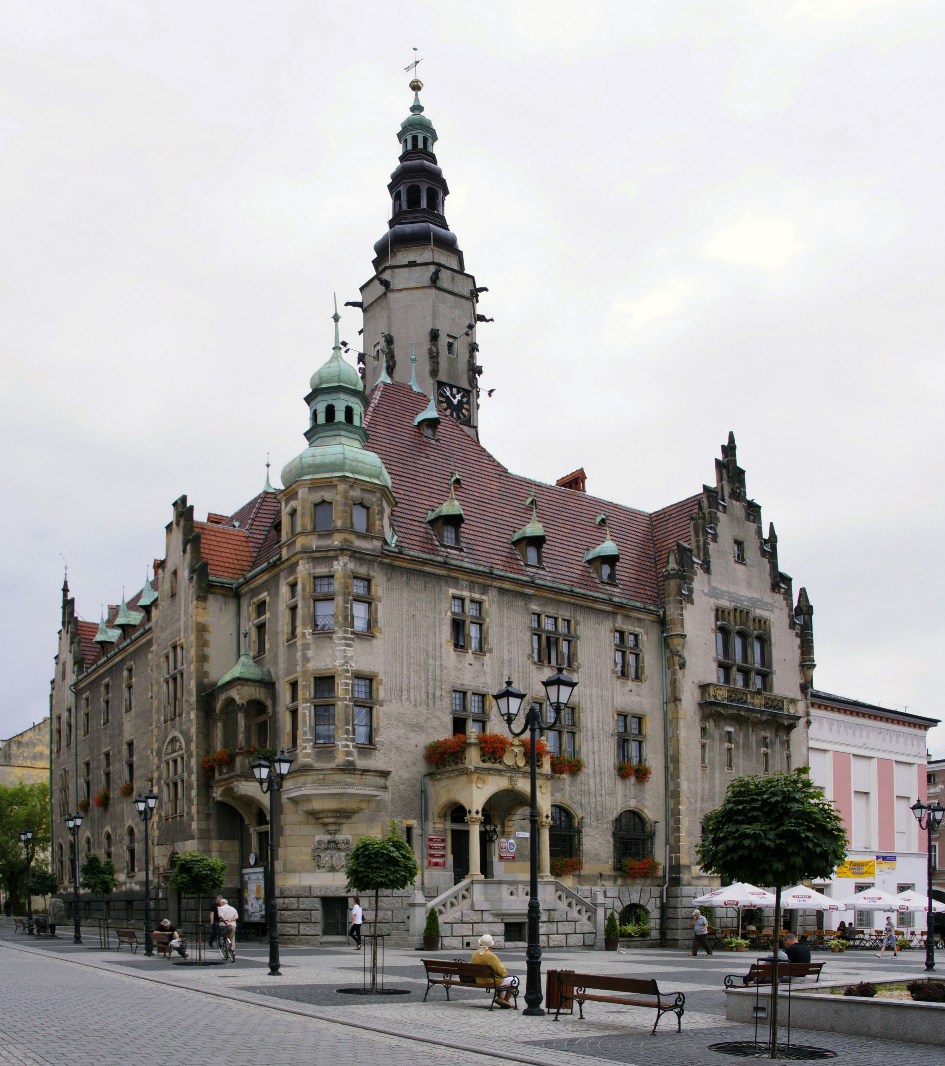 Jawor, Rynek - ratusz, XIX, z wieżą 2 poł. XIV, XVII (zabytek nr rejestr. A/2950/493/L)